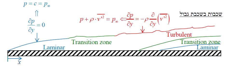 שכבות בתוך שכבת הגבול